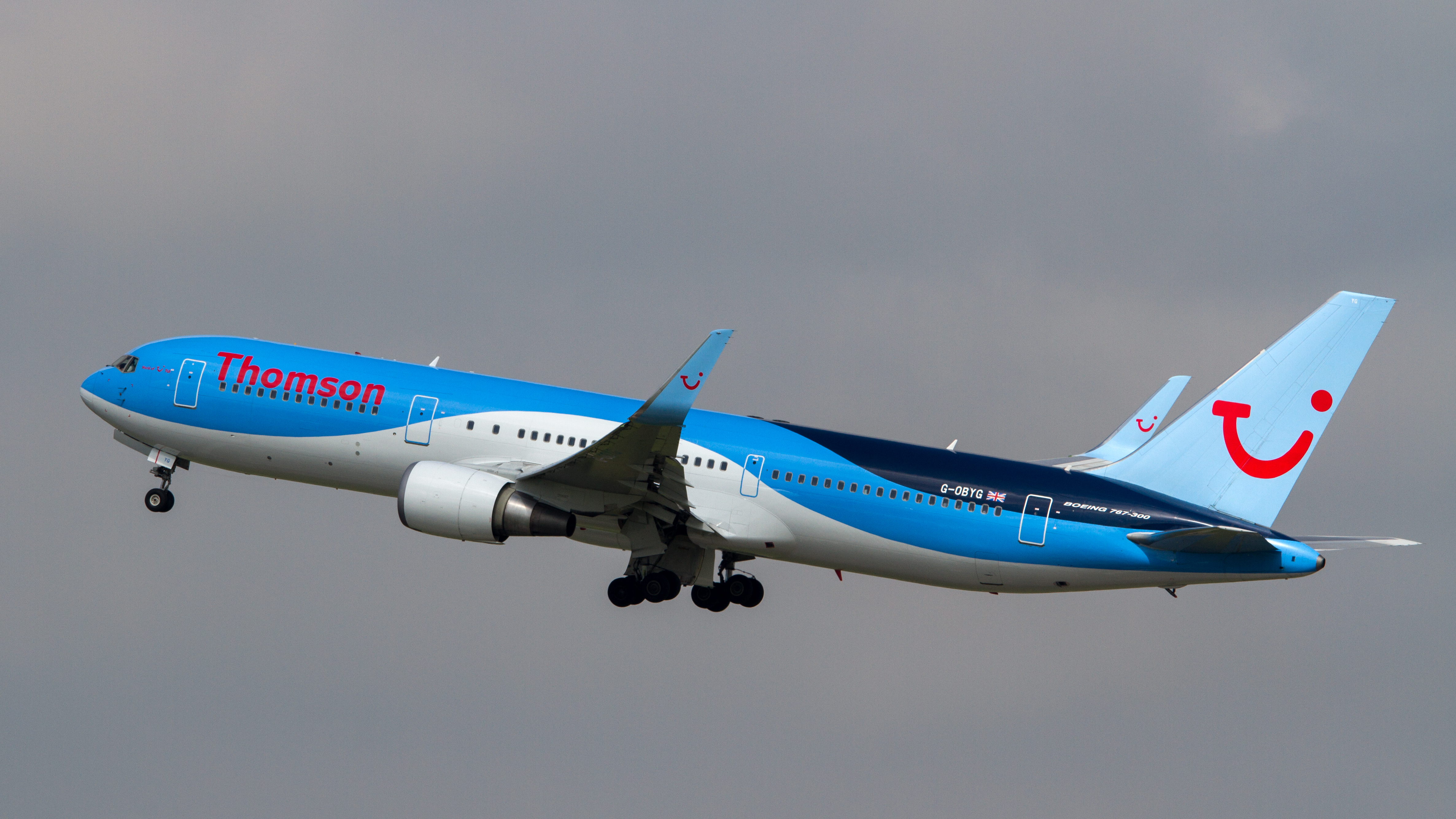 Manchester 31.05.13.